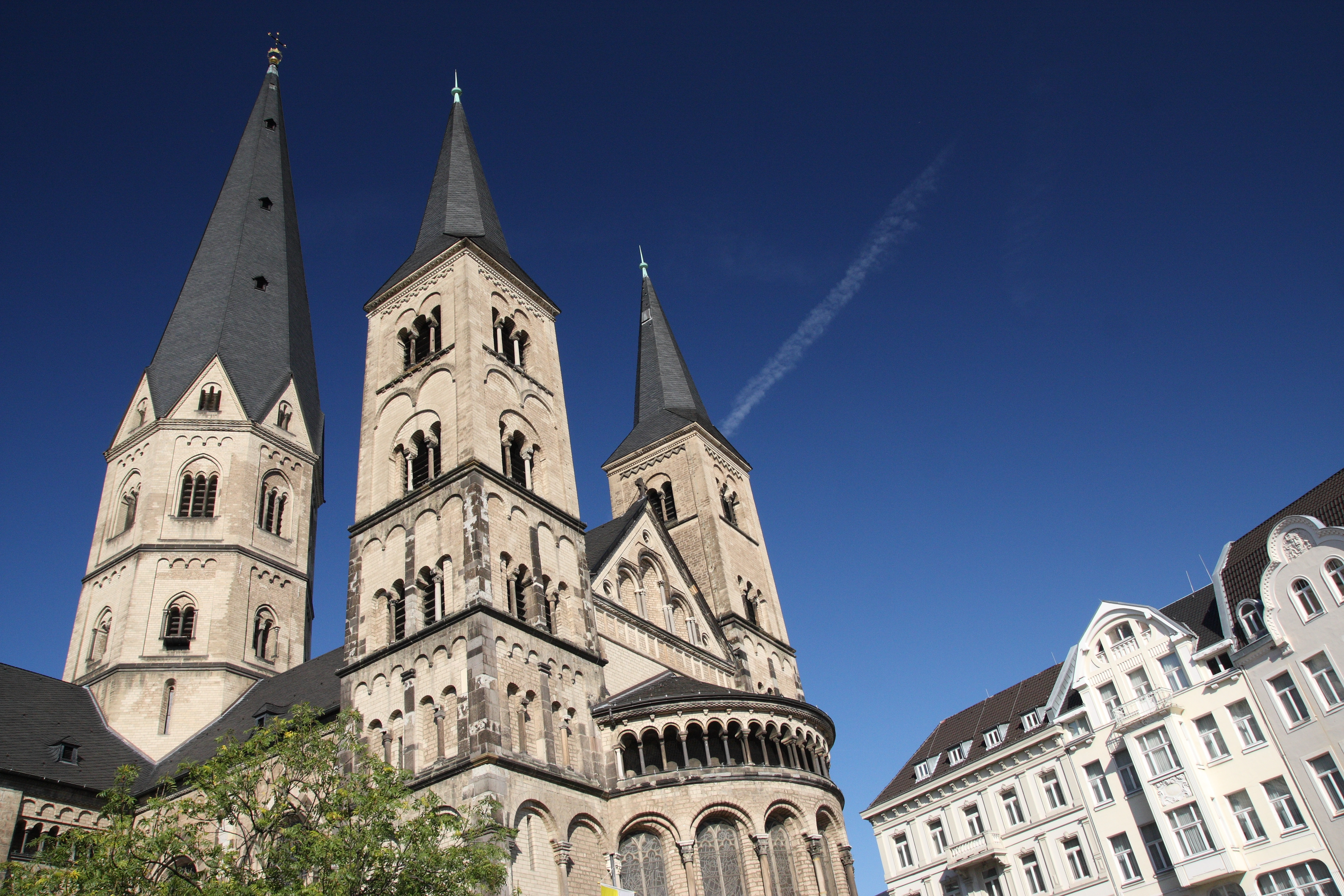 Munster Basilica, Bonn, Germany